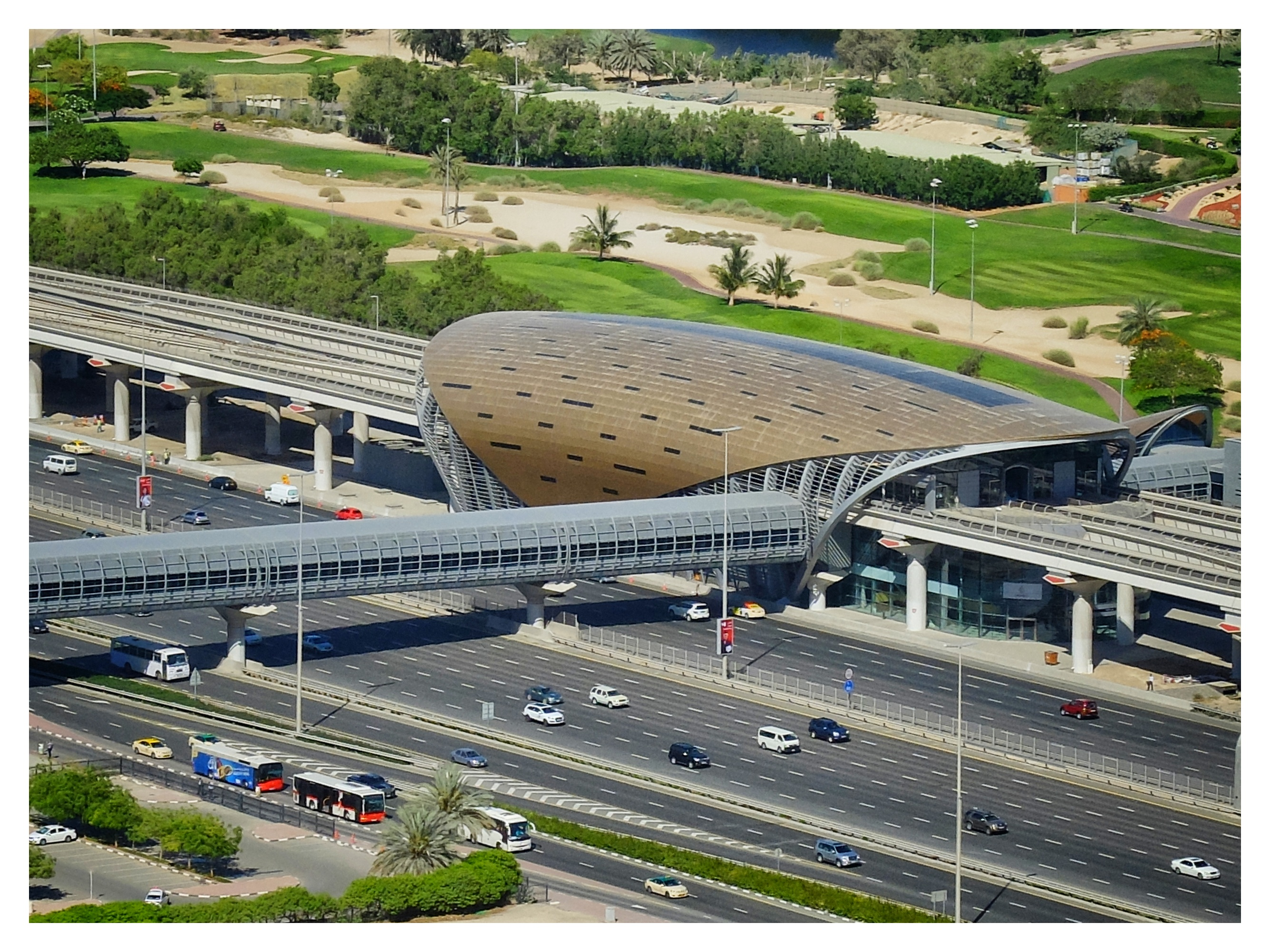 Metro station